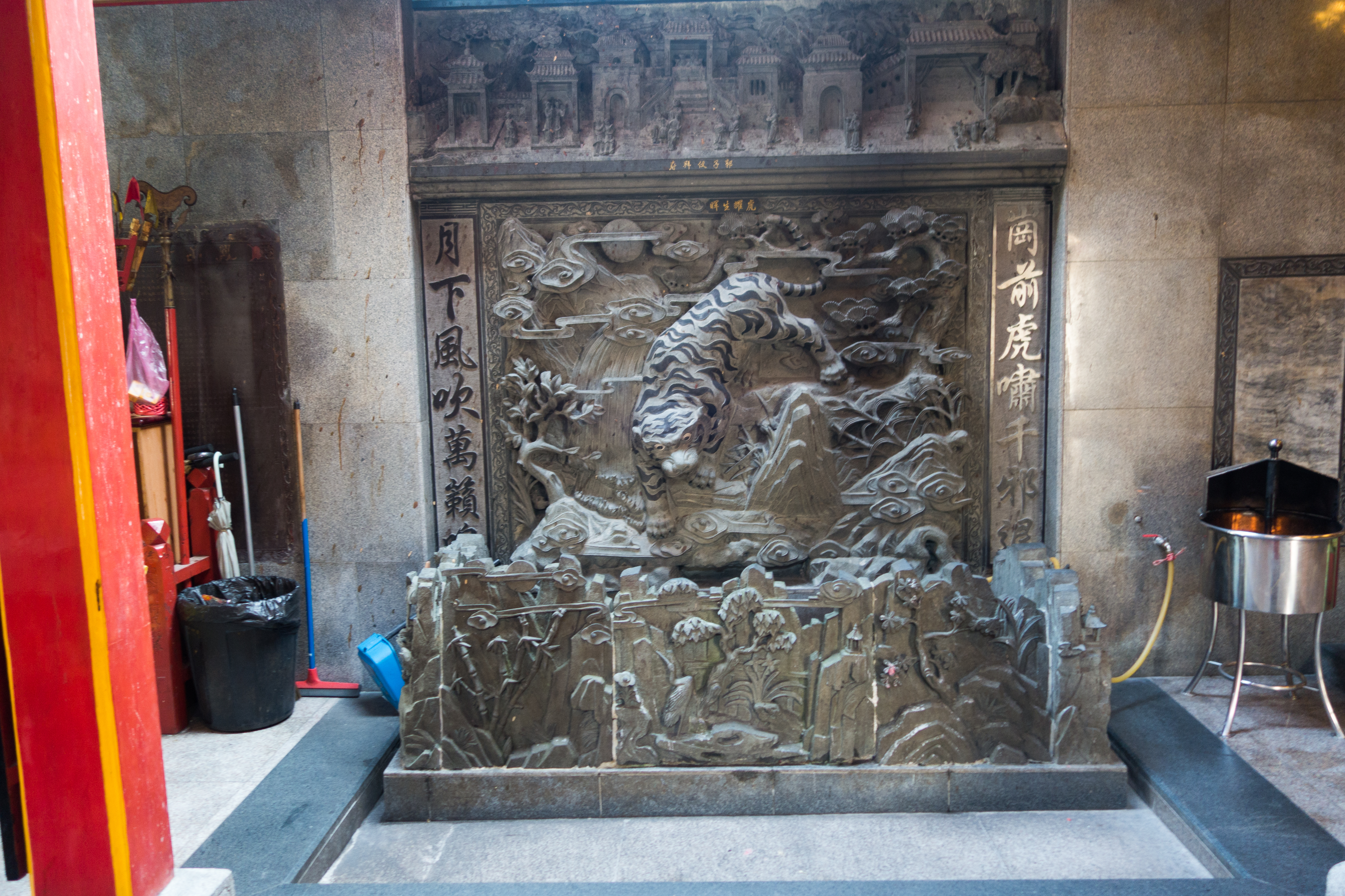 Kuching, Sarawak, Malaysian Borneo